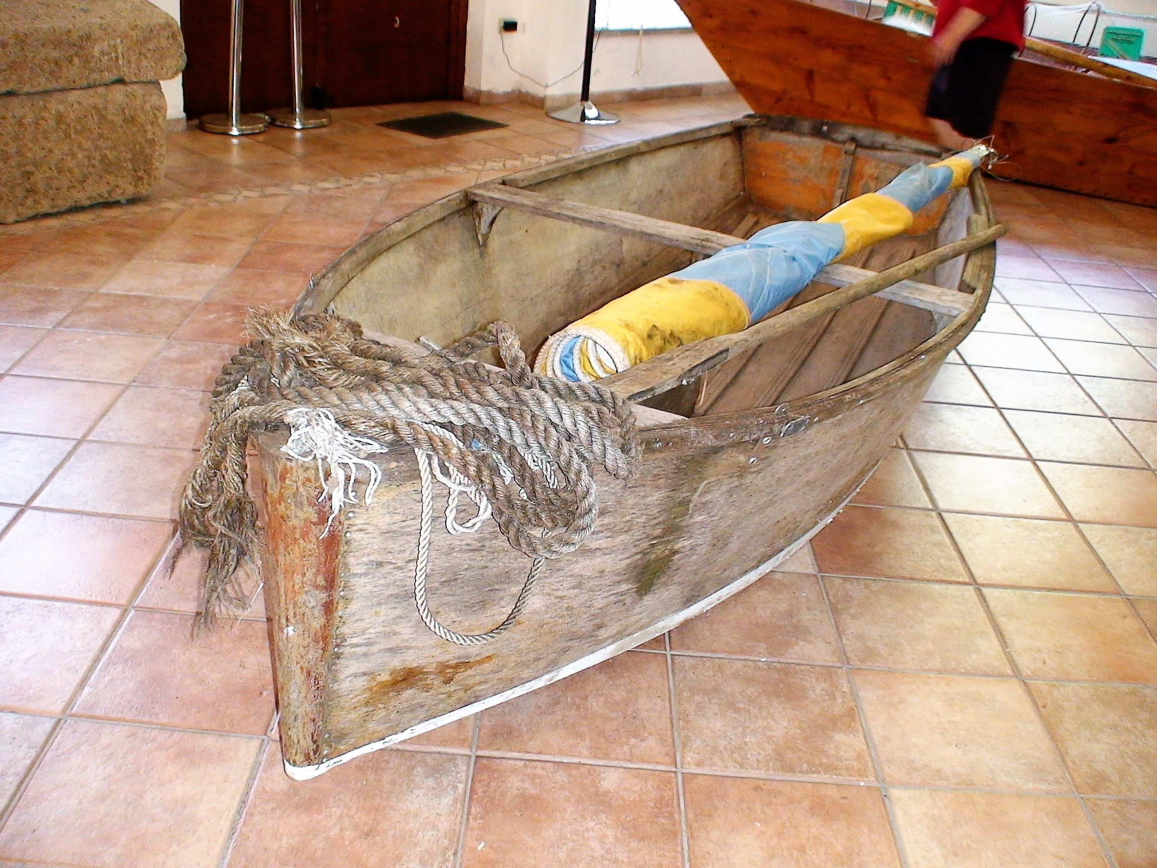 Questa piccola barca a vela fu creata negli anni Trenta dai Fratelli Cerocchi e da Federico Zunino per le gare veliche sul lago di Bracciano.